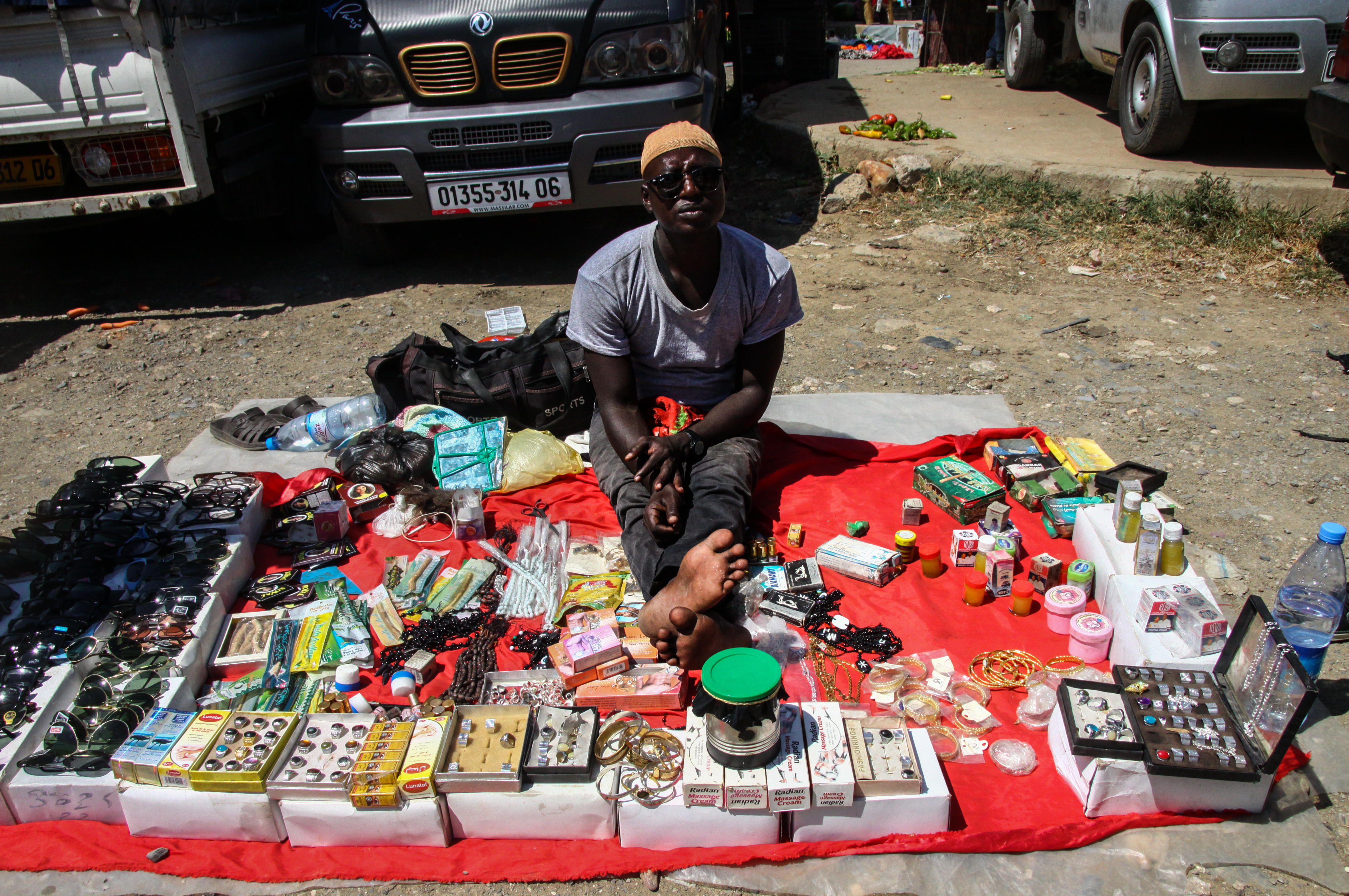 Un réfugié subsaharien, essayant de subsister aux besoins de sa famille en vendant à même le sol des crèmes ou pomades, du Miswak et même des lunettes de soleil. C'était lors du marché hebdomadaire d'Adekar, ce charmant village de petite kabylie au nord de l'Algérie, où j'ai passé une dixaine de jours à flâner dans ses rues escarpées, faisant entendre un bruit métallique étouffé au fond de mon sac à dos, celui des boîtes de lait en poudre dont je me servais pour prendre mes photos, des stenopés. This is an image of "African people at work" from Algeria